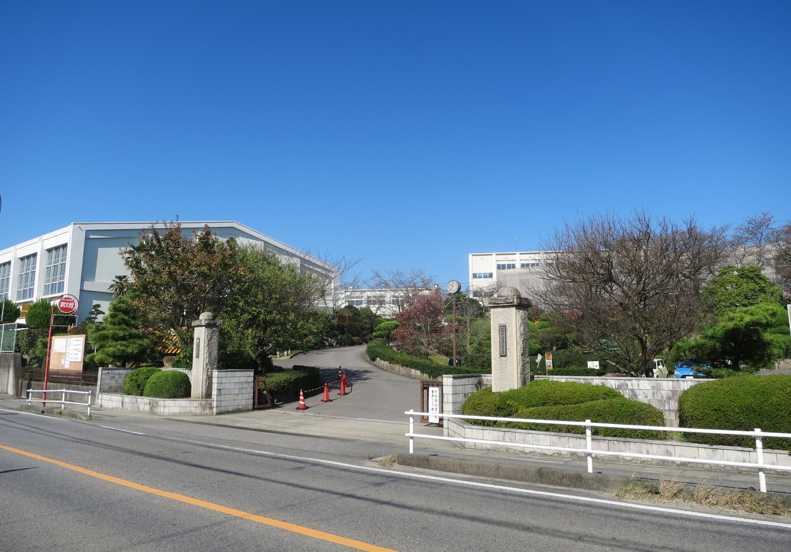 愛知県立岩津高等学校